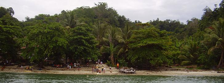 Kampong Leahlohi Samasuru